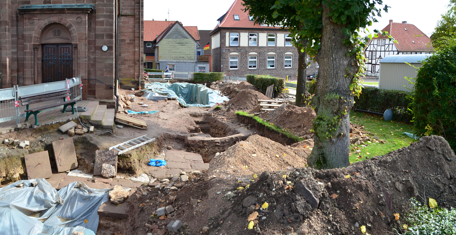 Stiftskrypta Nörten, Blick auf die mit Planen abgedeckte Grabungsstelle von Westen